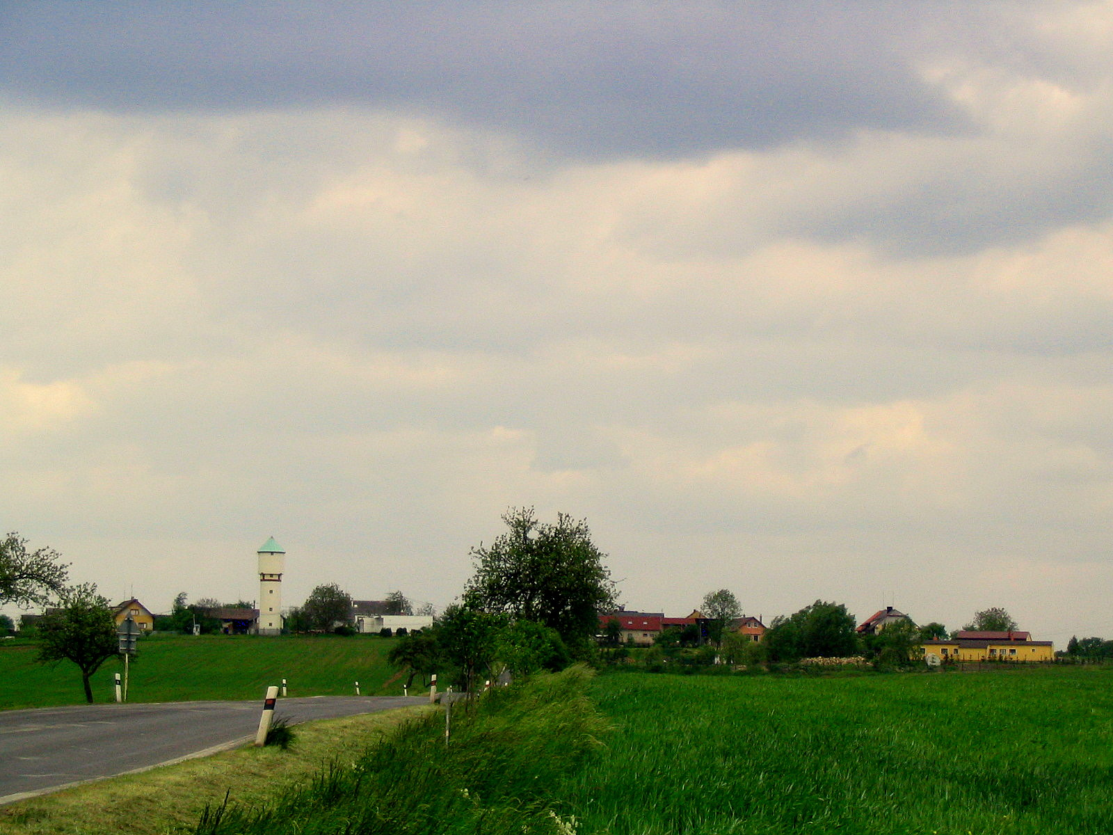 village Bílá_Hlína, Czech Republic